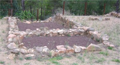 Imagen tomada con cámara digital. 2004 Yacimiento arqueológico categoría:Arqueología (imagen)